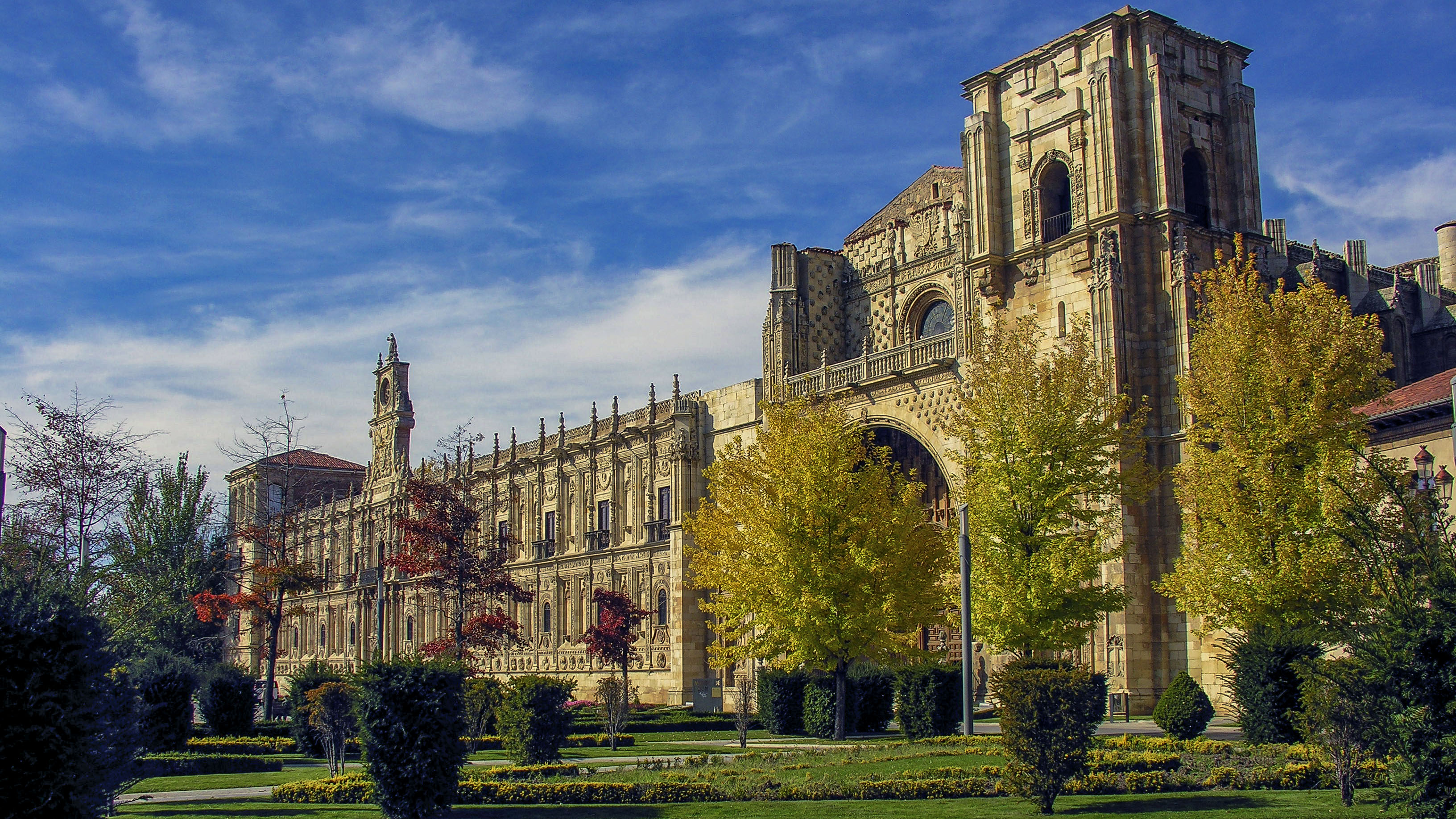 El precioso hotel es un museo viviente de señoriales salones, con un Claustro y una Sala Capitular espectaculares. El Hostal de San Marcos es uno de los hoteles monumentales más extraordinarios del viejo continente. Su construcción, junto al puente que atraviesa el río Bernesga, a las afueras de León, se inició en el siglo XVI.